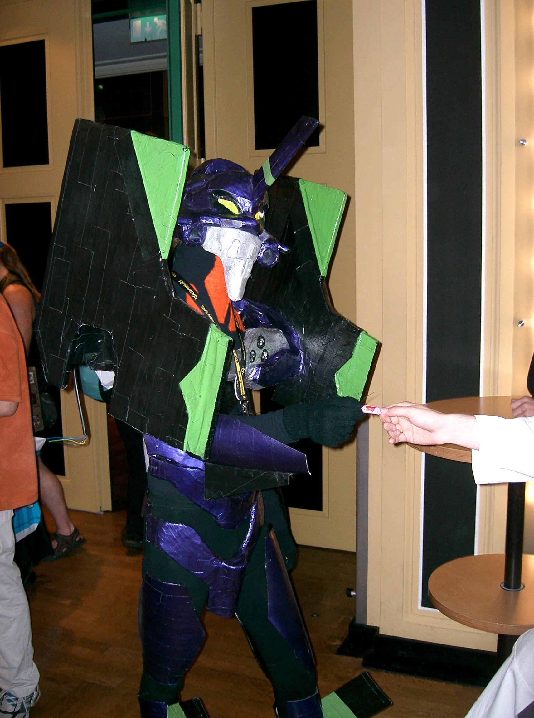 Ein Evangelion Einheit 01 cosplay auf der Connichi 2004.